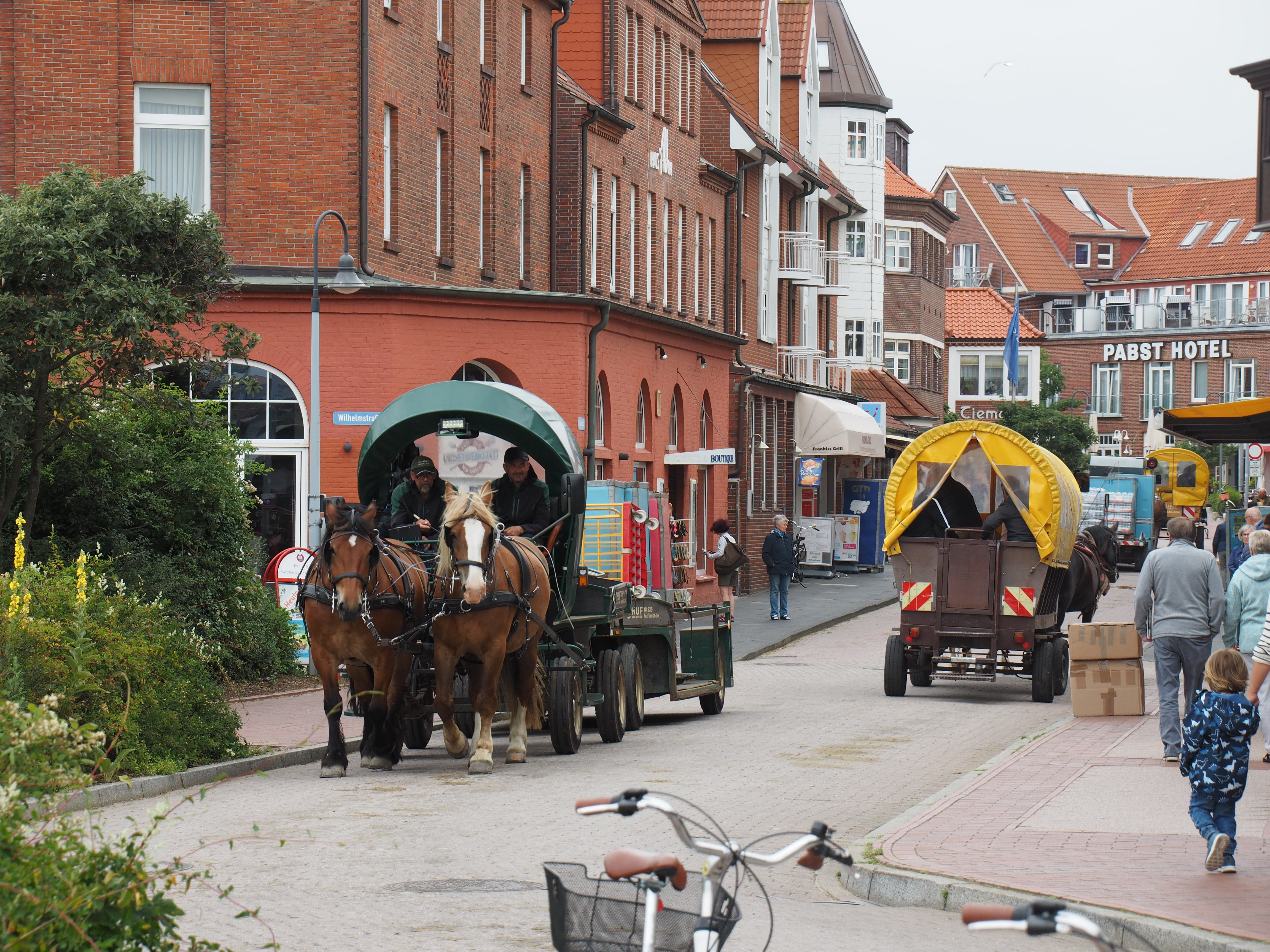 Verschiedene Pferdefuhrwerke in der Gemeinde Juist